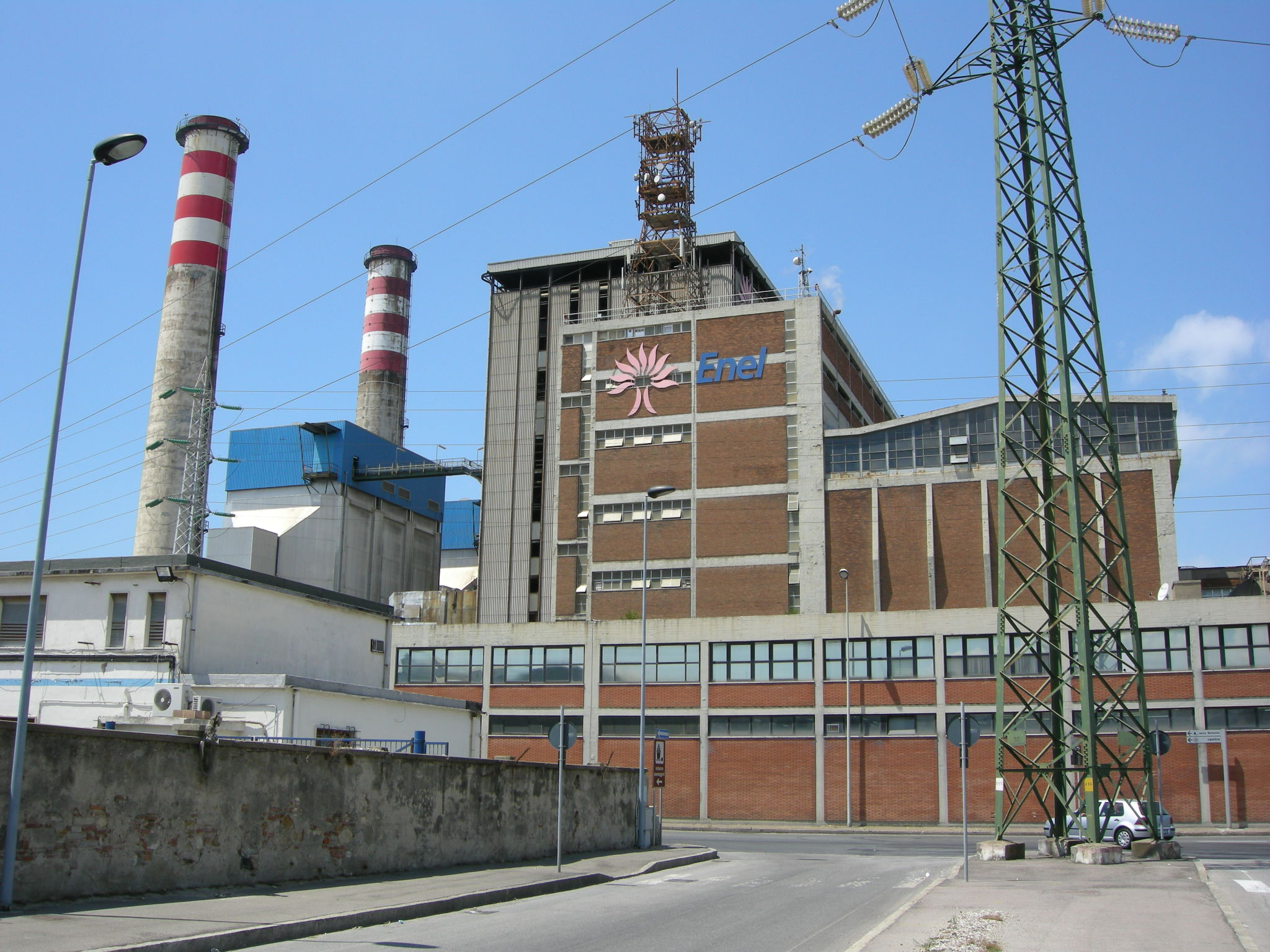 Centrale termoelettrica Marzocco